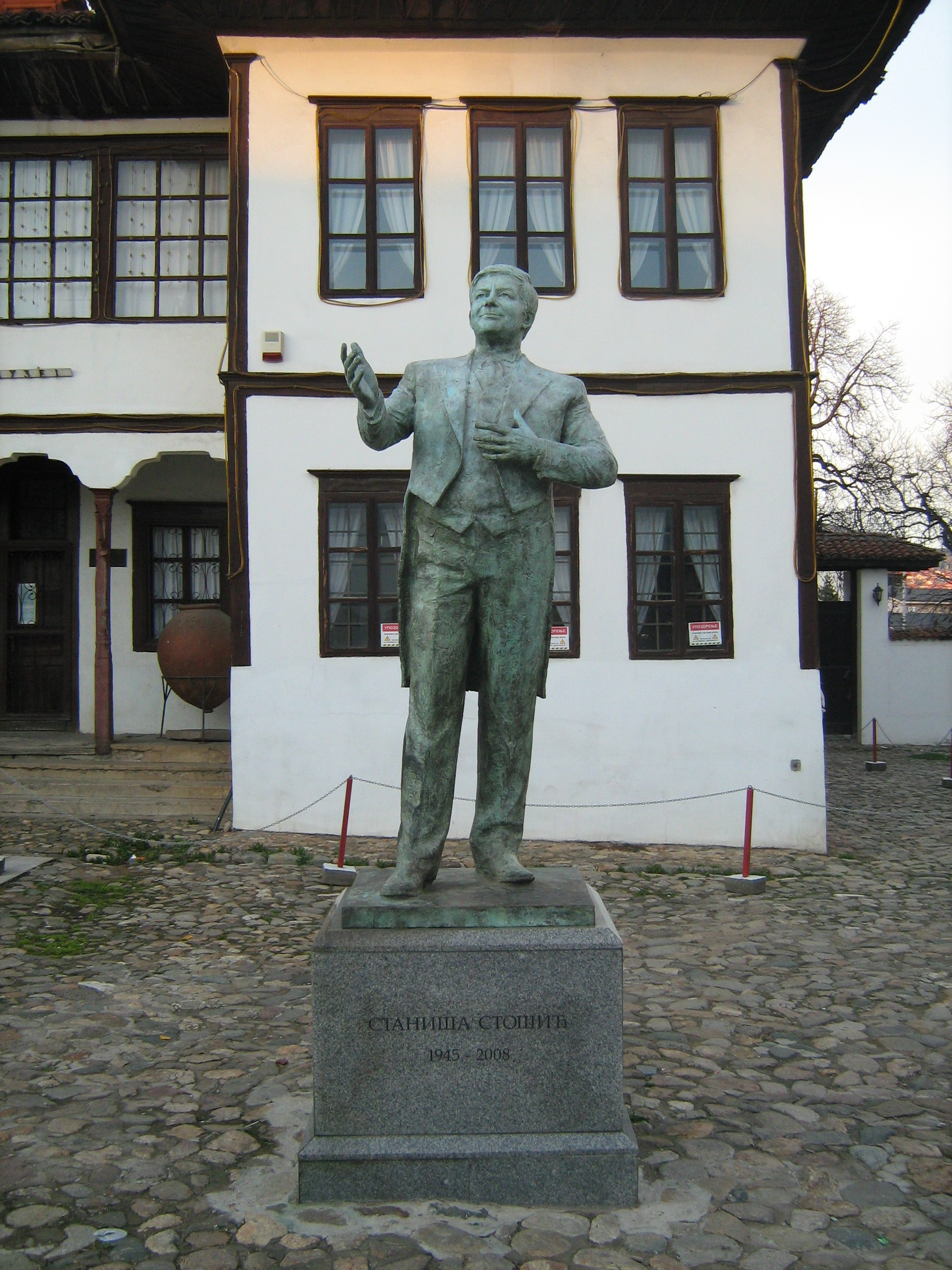 Пашин конак - салемлук, зграда Народног музеја у Врању